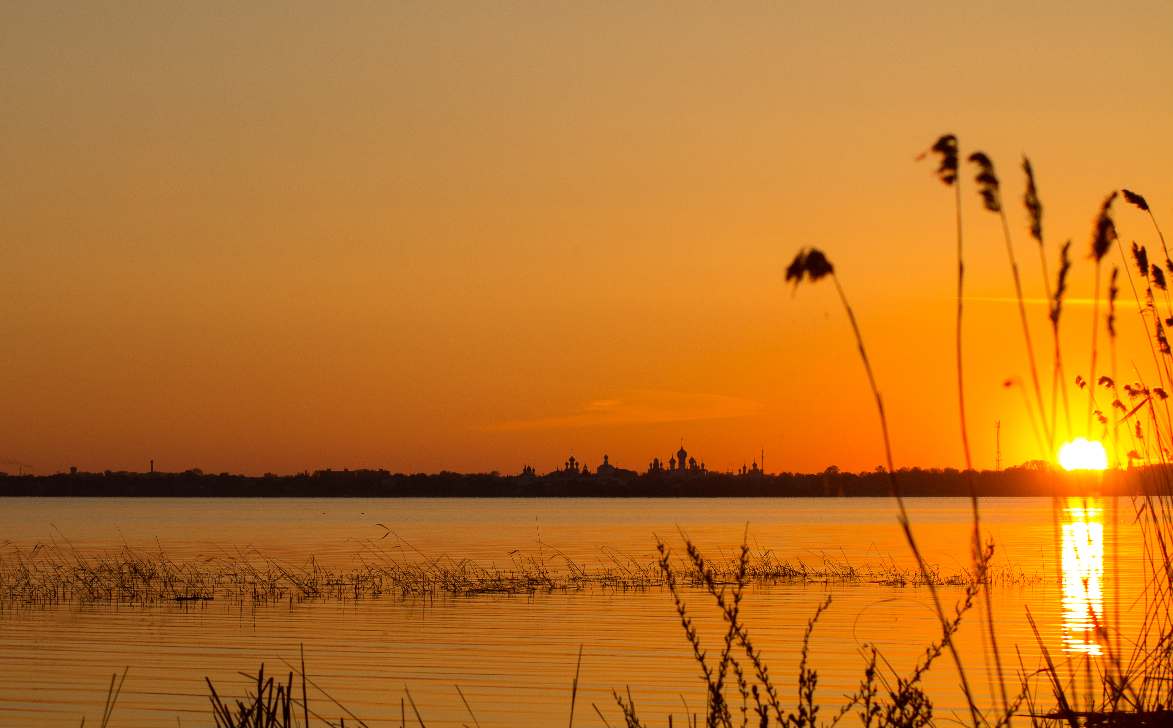 Озеро Неро: Кюго-востоку от г. Ростов, Ростов Великий, Ростовский район, Ярославская область This image is related to the protected area of Russia number 7610328